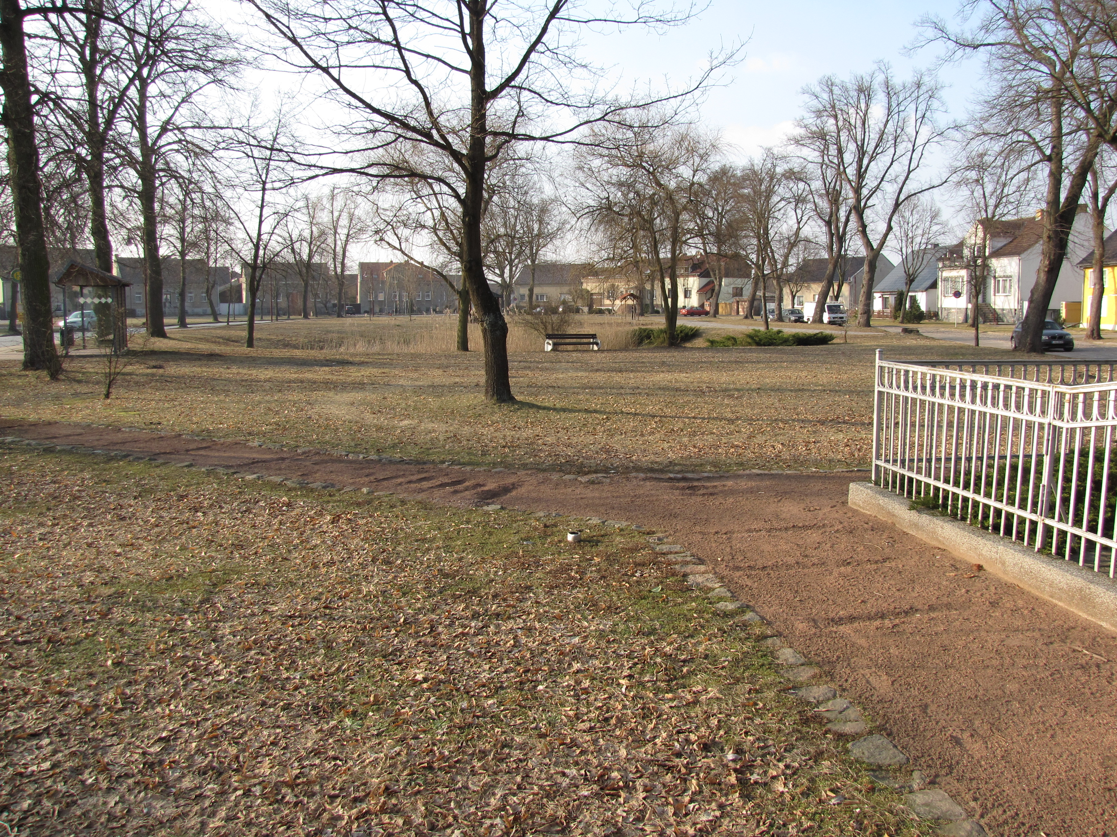 Dorfaue in Schöneiche, Stadt Zossen, Brandenburg, Deutschland